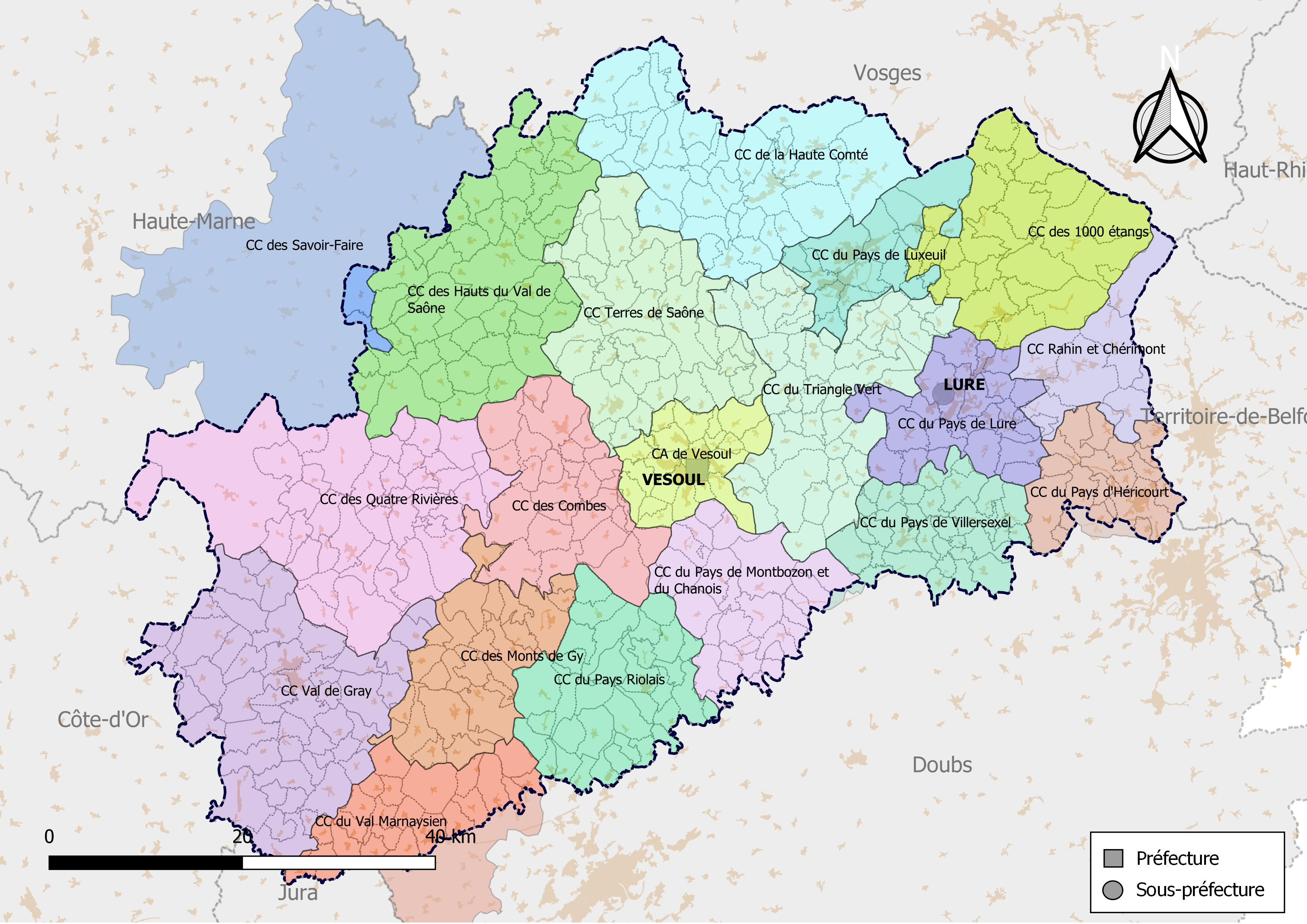 Carte des intercommunalités du département de Haute-Saône, France. Composition au 1er janvier 2019.